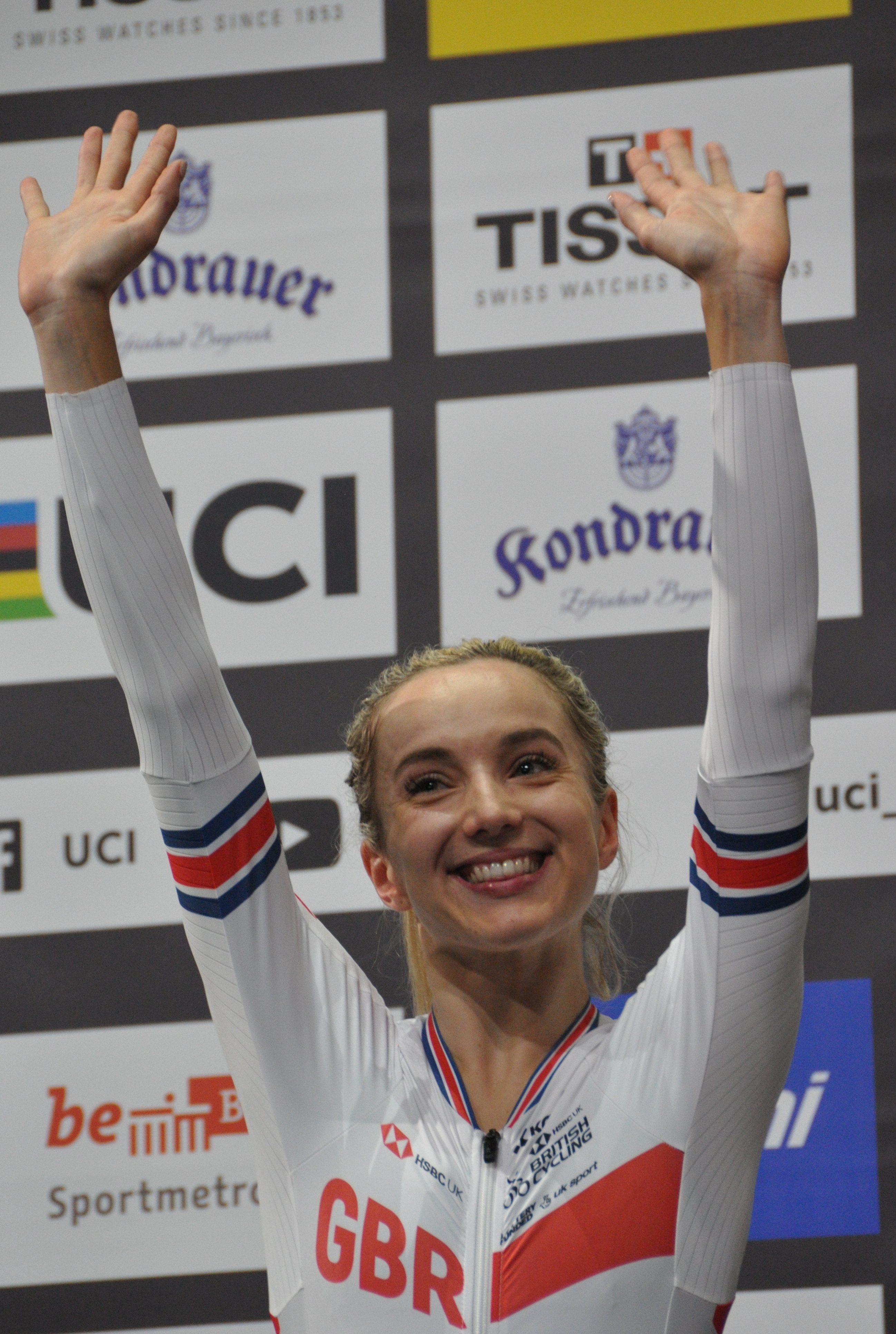 Elinor Barker, britische Radsportlerin